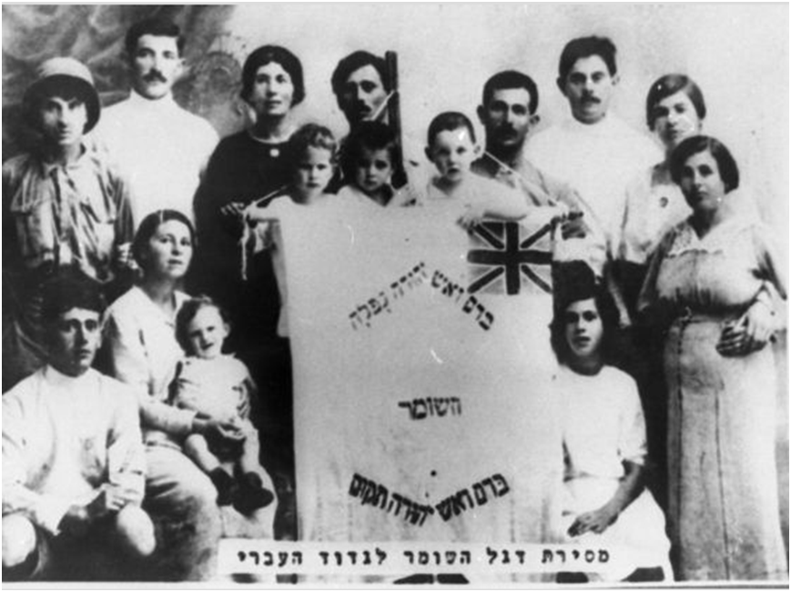 דגל השומר נמסר לגדוד העברי. עומדים: שני משמאל מרדכי יגאל, שלישית משמאל רחל ינאית בן צבי, רביעי משמאל נח סונין